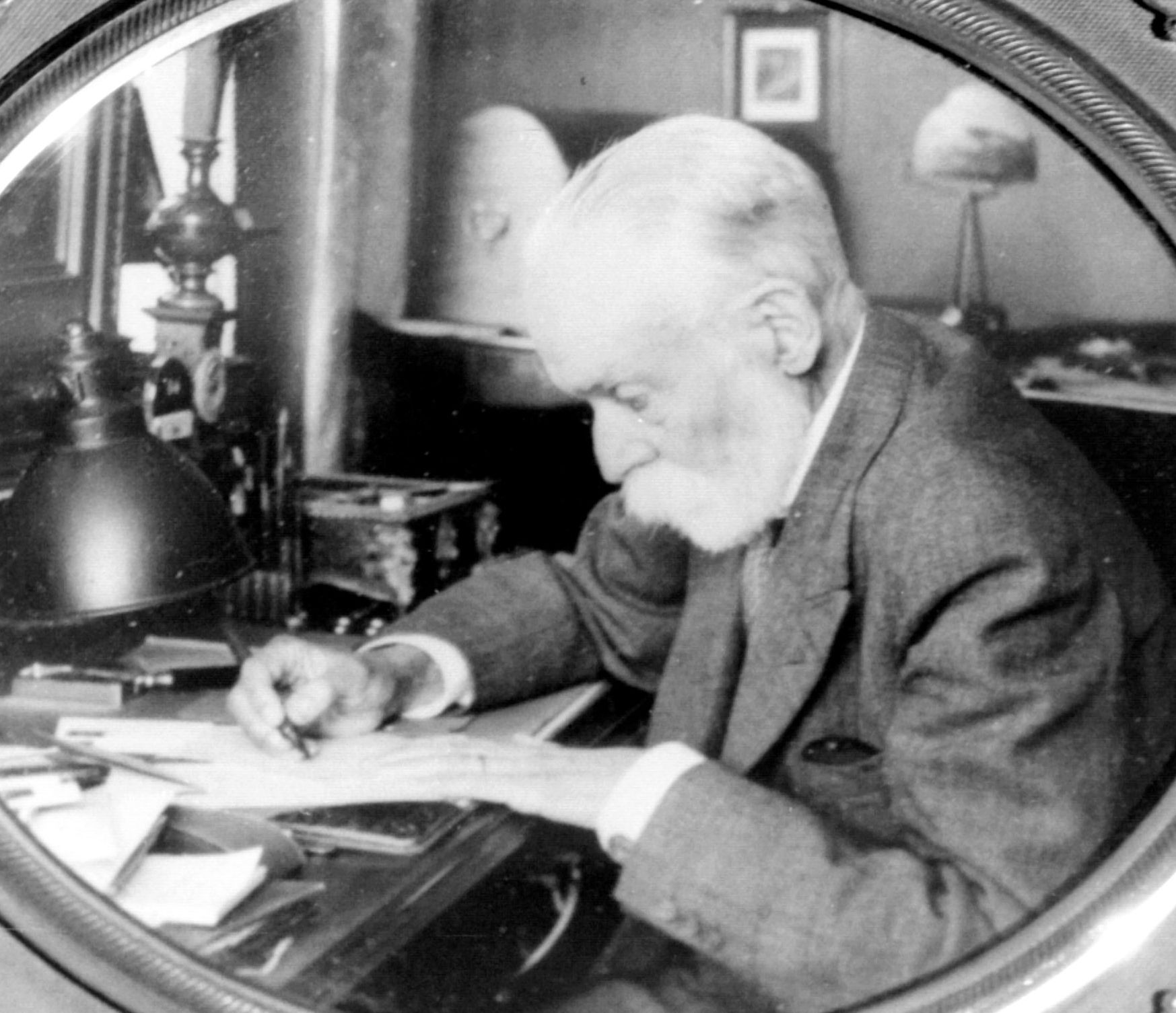 Auguste Sérieyx à sa table de travail (vers 1947).